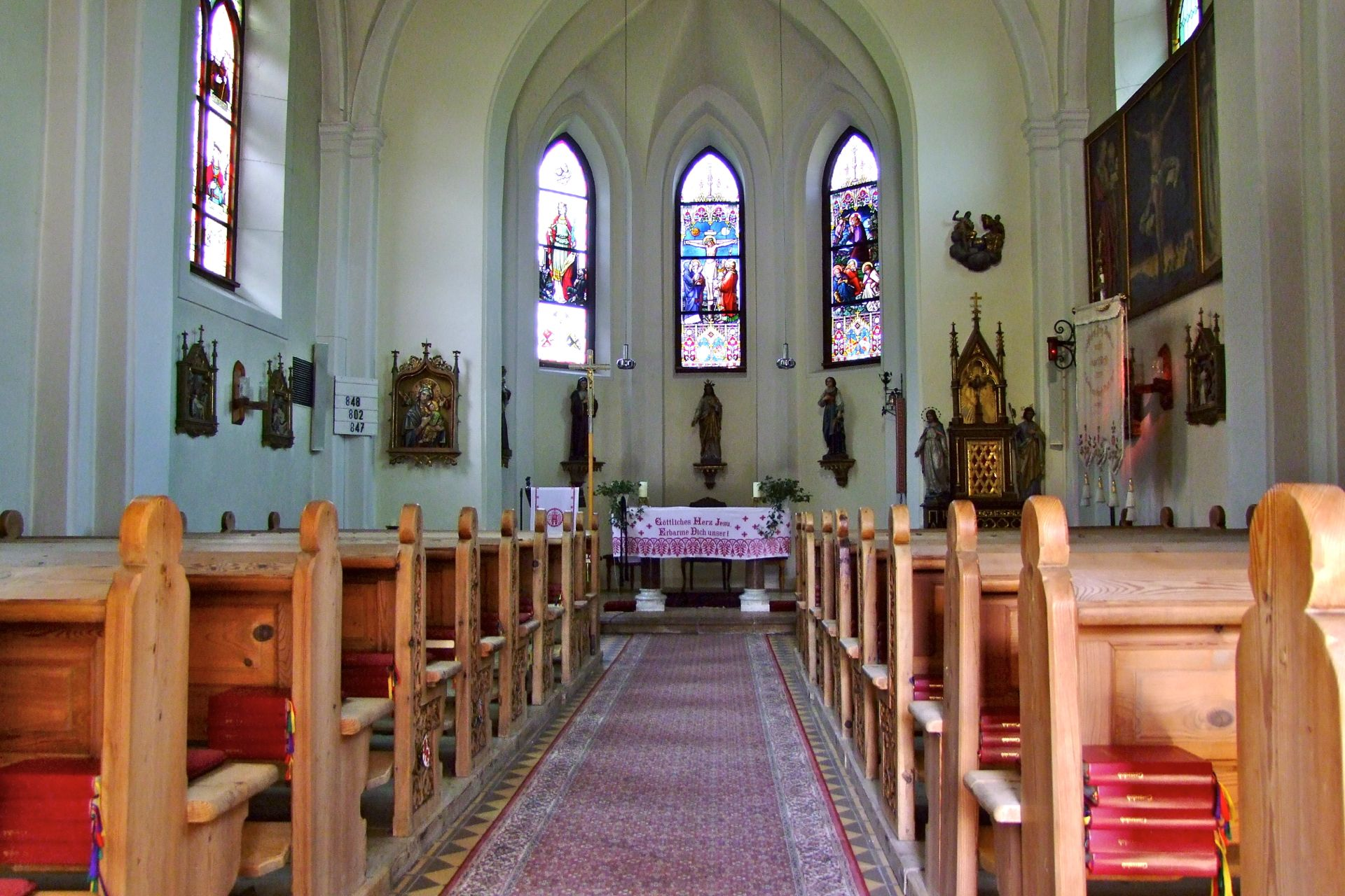 Kath. Pfarrkirche Herz Jesu